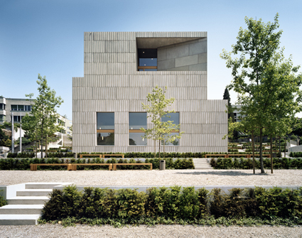 Dreilindenschulhaus Propsteimatte, Luzern, Switzerland